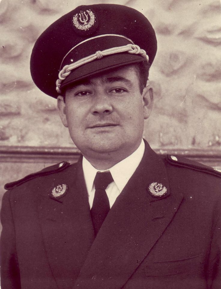 Sebastián Valero Jiménez. Ilustre maestro y compositor musical español, original de Huelma (Jaén)